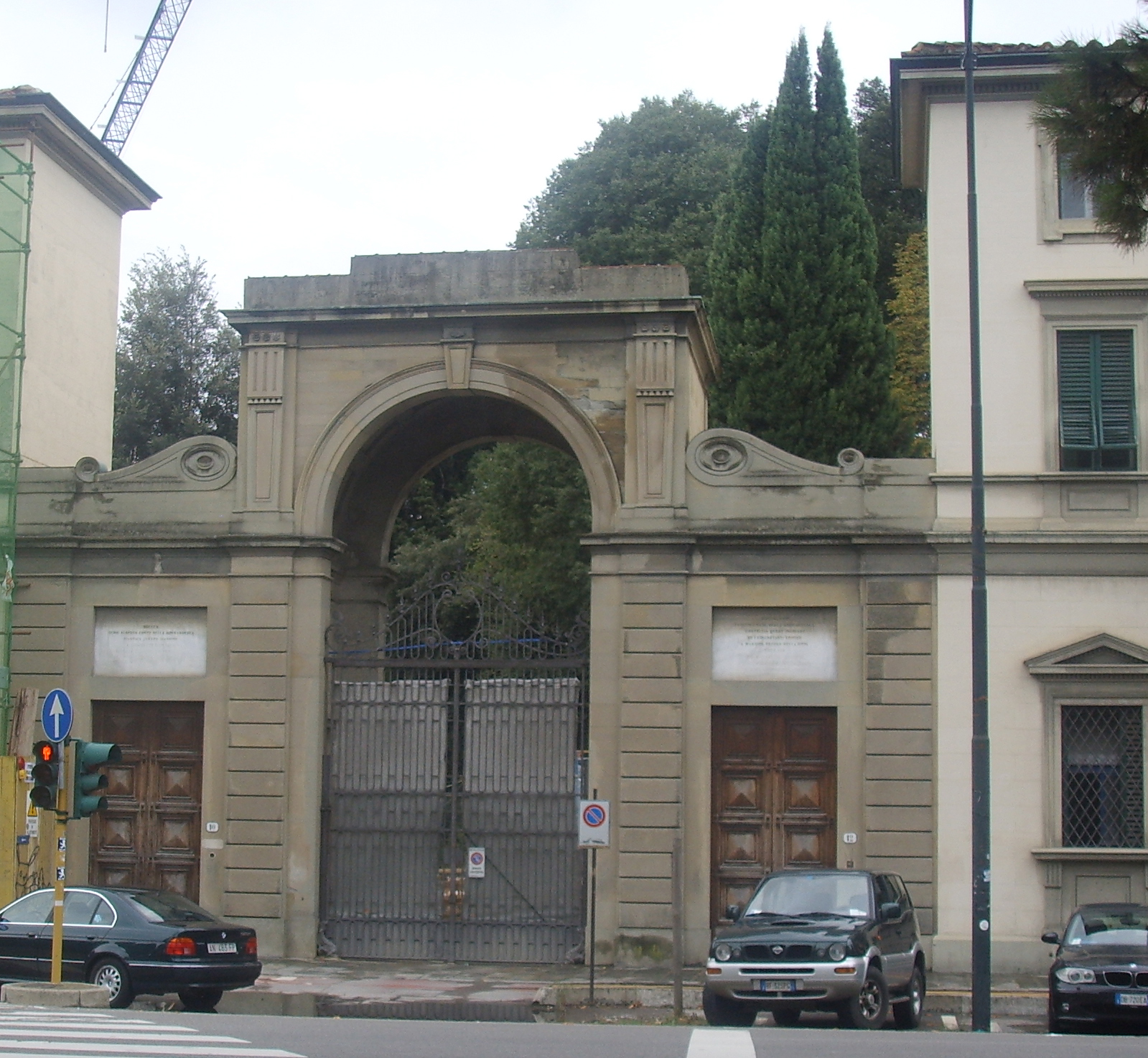 Giardino_della_Gherardesca,_entrata, entrance in Florence, italy